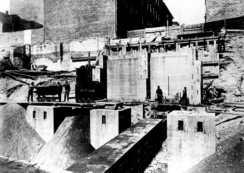 Kungsgatan/Regeringsgatan: grundarbeten i betong för Regeringsgatans bro över Kungsgatan